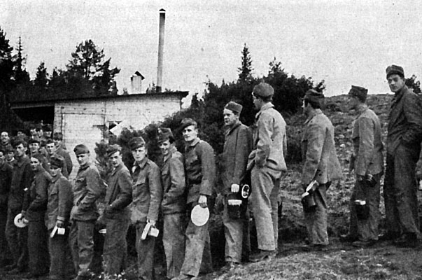 Interneringsläger, Sveg 1939-42